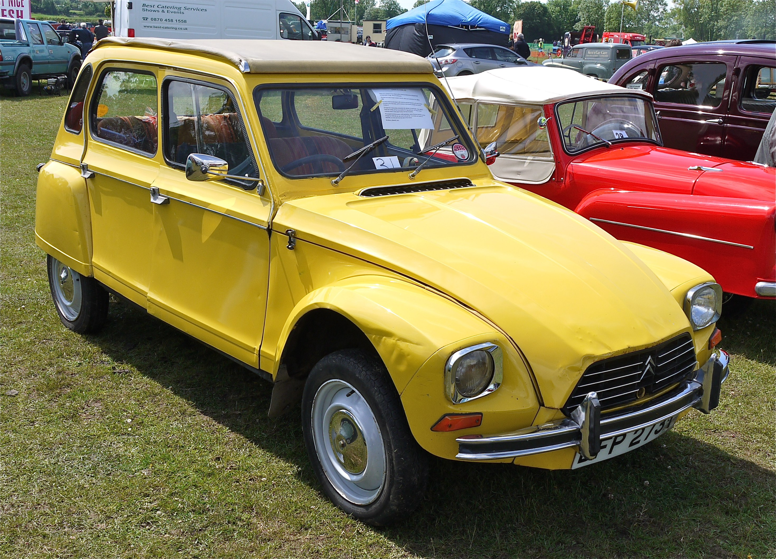 Panasonic G1 14-45 Lens iA mode